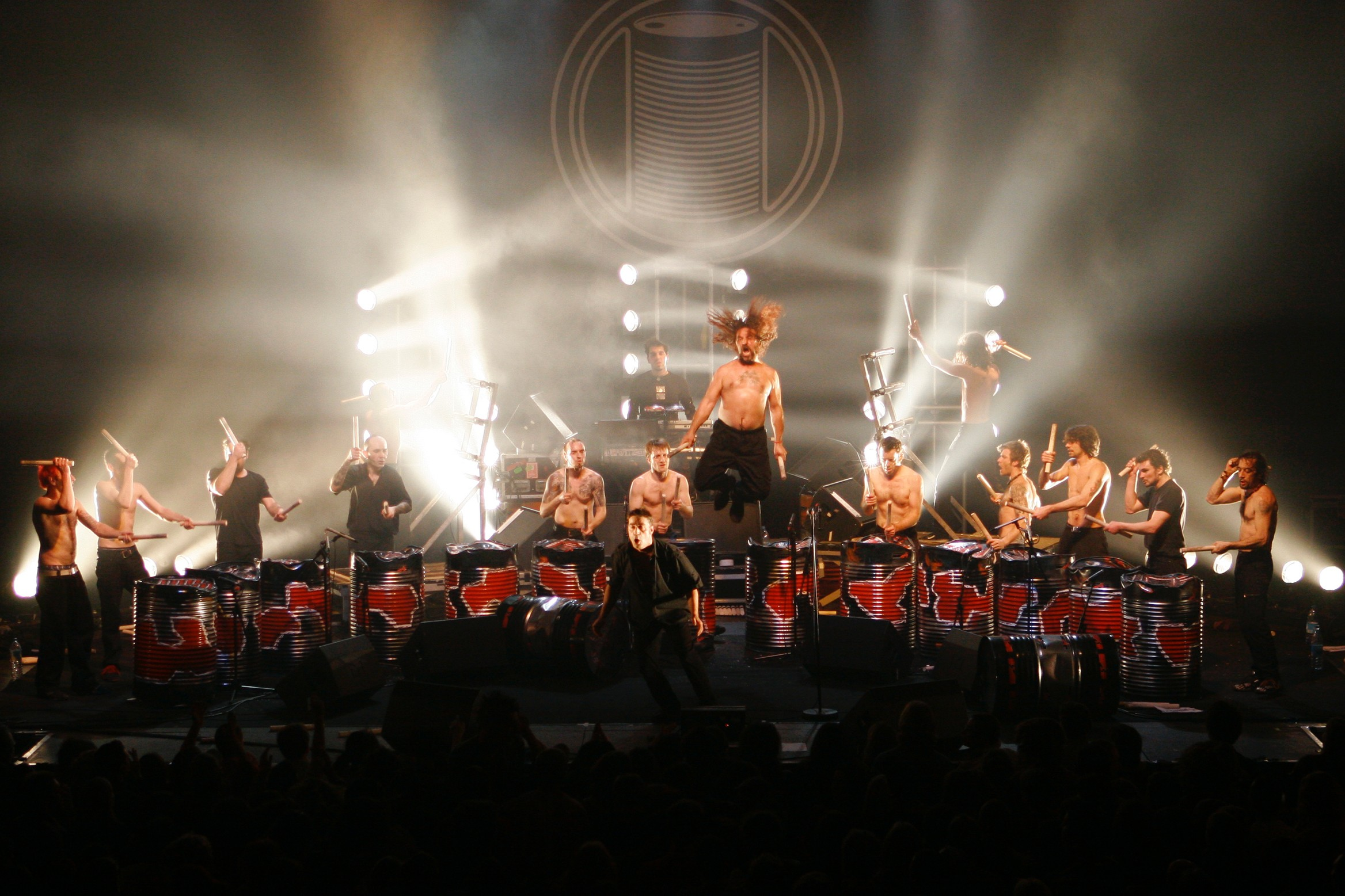 Les tambours du bronx 3